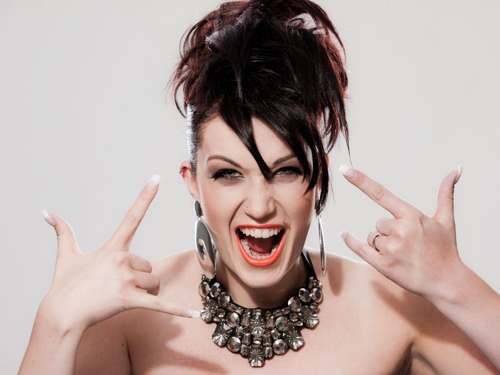 Hella Donna Coverfoto Groove on 2012 by Marco Mueller